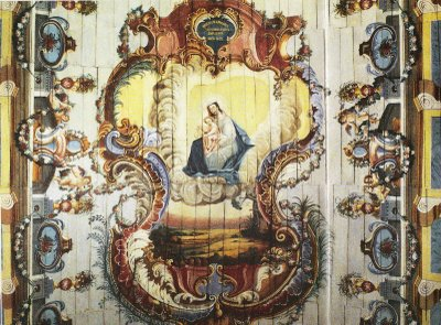 Forro da Igreja Matriz de Pirenópolis,pintura do século XVIII.Incêndiada em 2002.